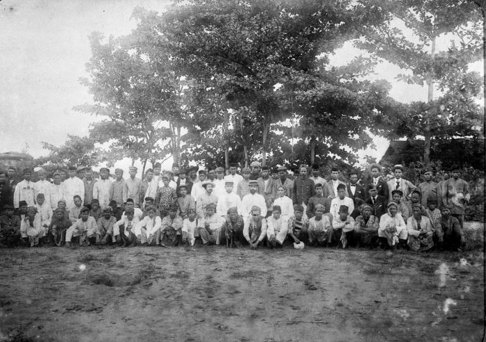 Foto. Foto is genomen tijdens de Eerste Zuid Nieuw-Guinea Expeditie. Groepsportret van dragers en deelnemers aan de Eerste Zuid Nieuw-Guinea Expeditie